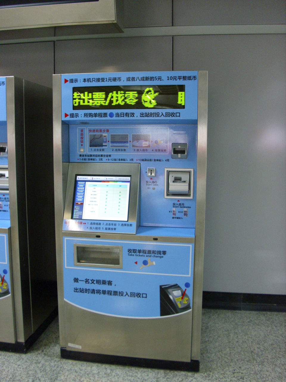 南京地铁2号线 自动售票机